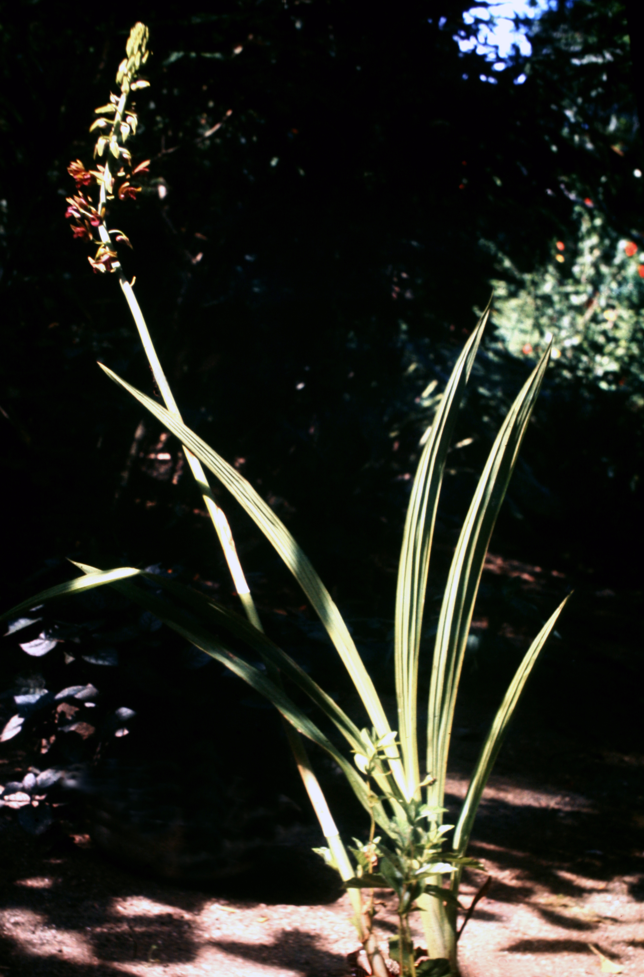 Eulophia alta. Suriname.